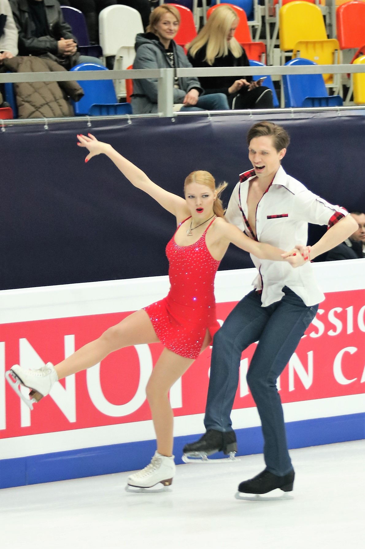 Виктория Ковалева и Юрий Беляев (Беларусь) на Чемпионате Европы по фигурному катанию 2018.